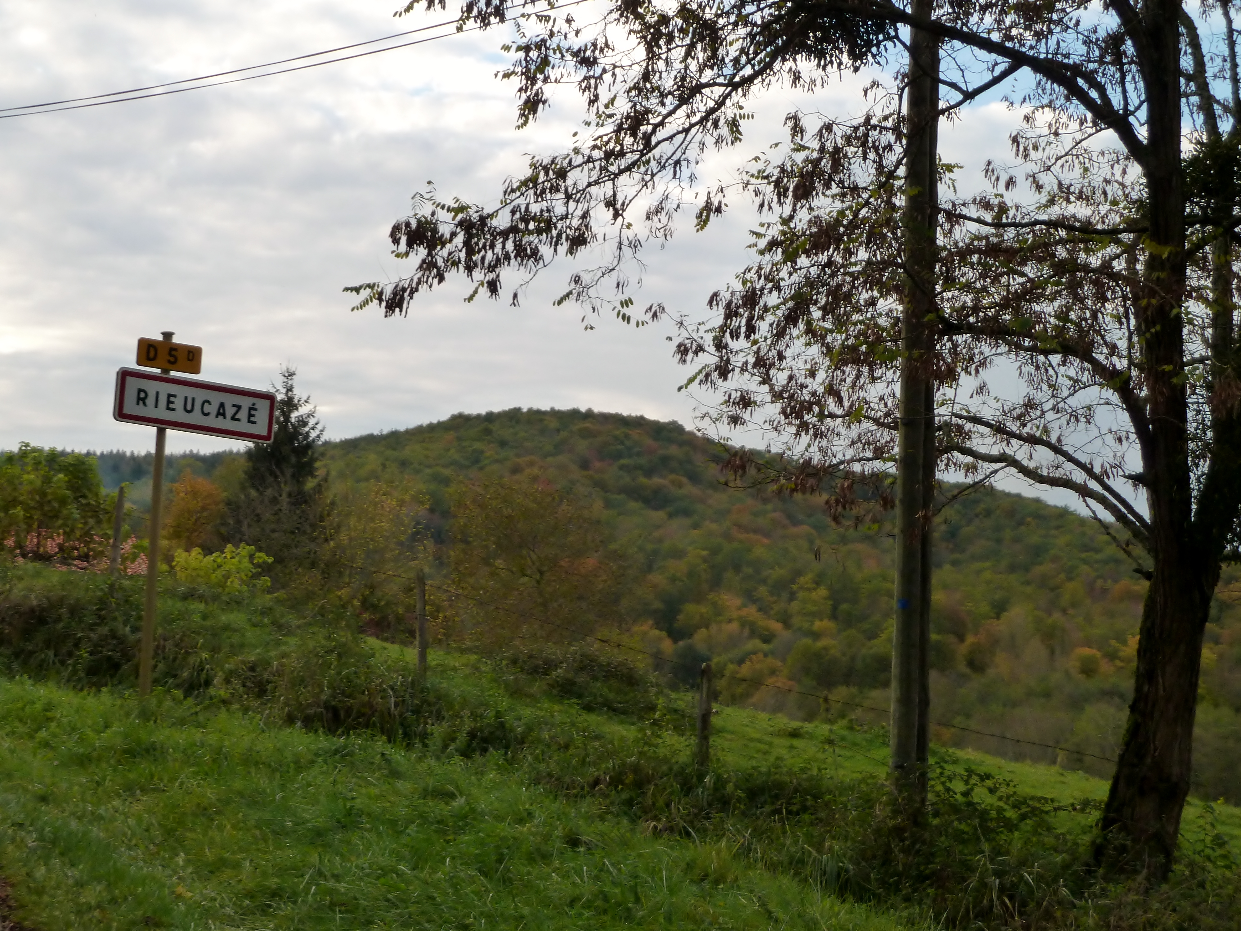 Entrée dans Rieucazé